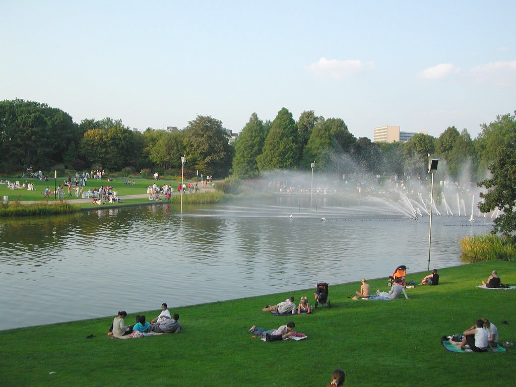 Sonntägliche Wiese in Planten un Blomen, Hamburg.